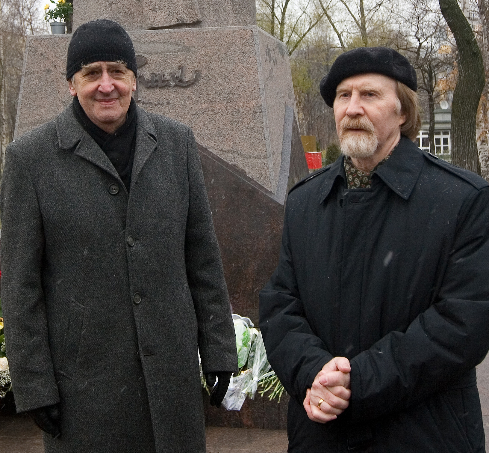 Авторы памятника Н.К. Рериху в Санкт-Петербурге: скульптор В.В. Зайко и архитектор Ю.Ф. Кожин в день открытия памятника